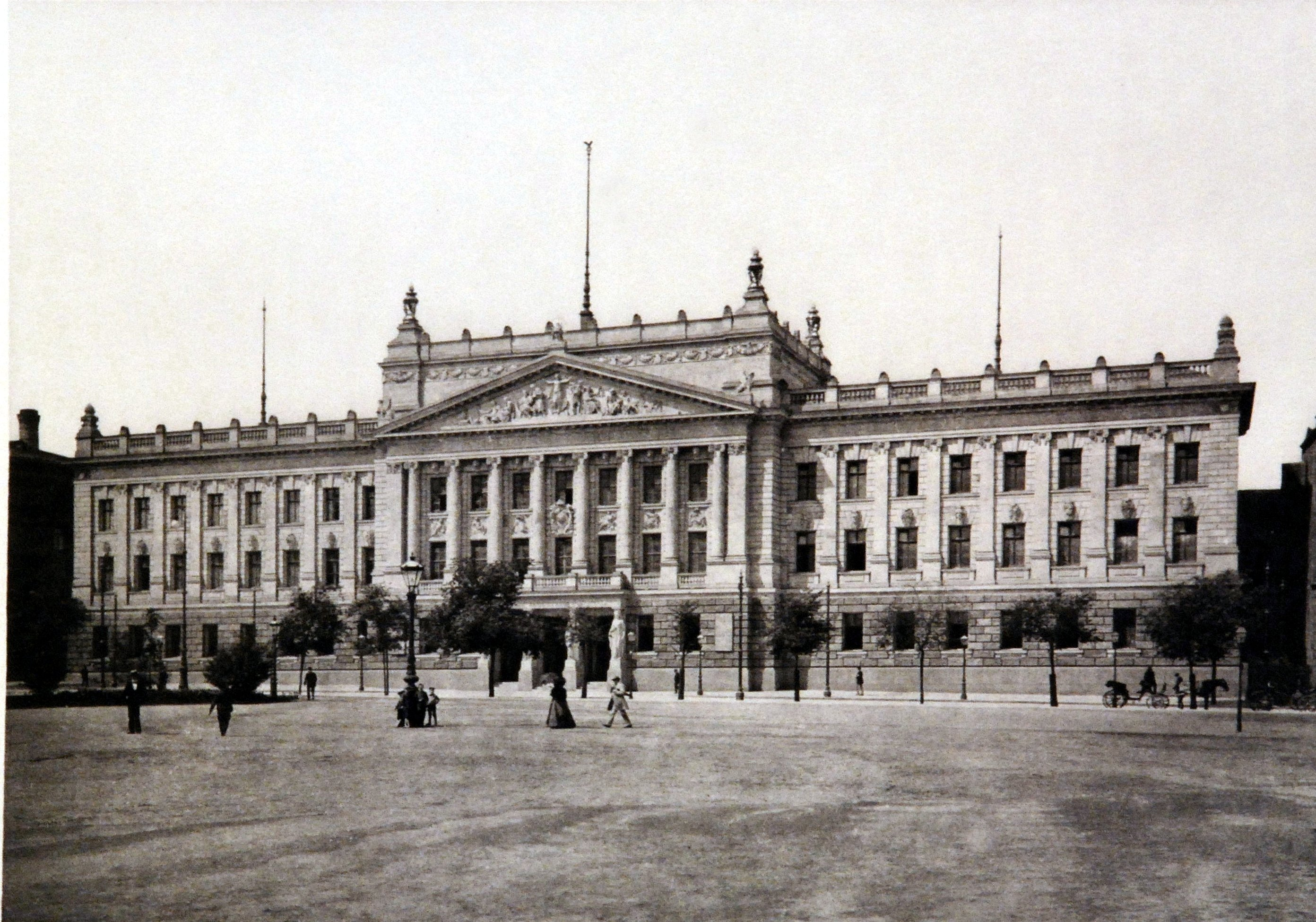 Universität 1898. Heliogravüre 19 x 25cm der Kunstanstalt Gustav Brinkmann Leipzig. thumb|Original Uploaded with Reworkhelper